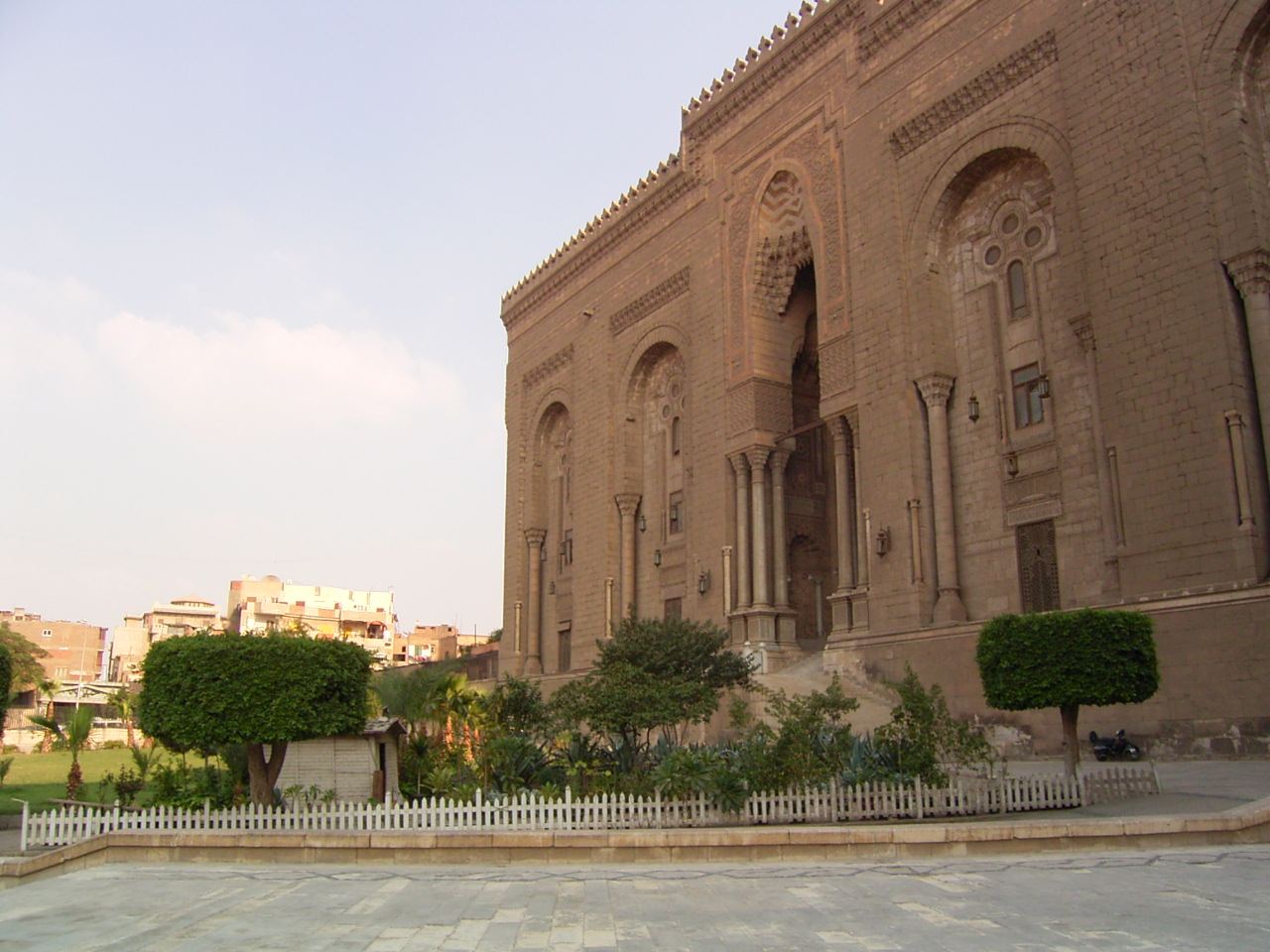 Mezquita del Al-Rifa'i en el Cairo, Egipto.